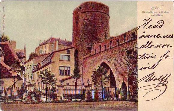 Tallinna linnamüüri kaitsetorn Nunnatorn piltpostkaardil